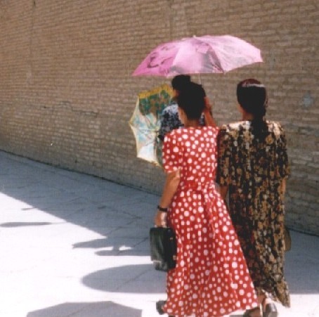 persona foto sen kopirajto Ĥiva majo 2000